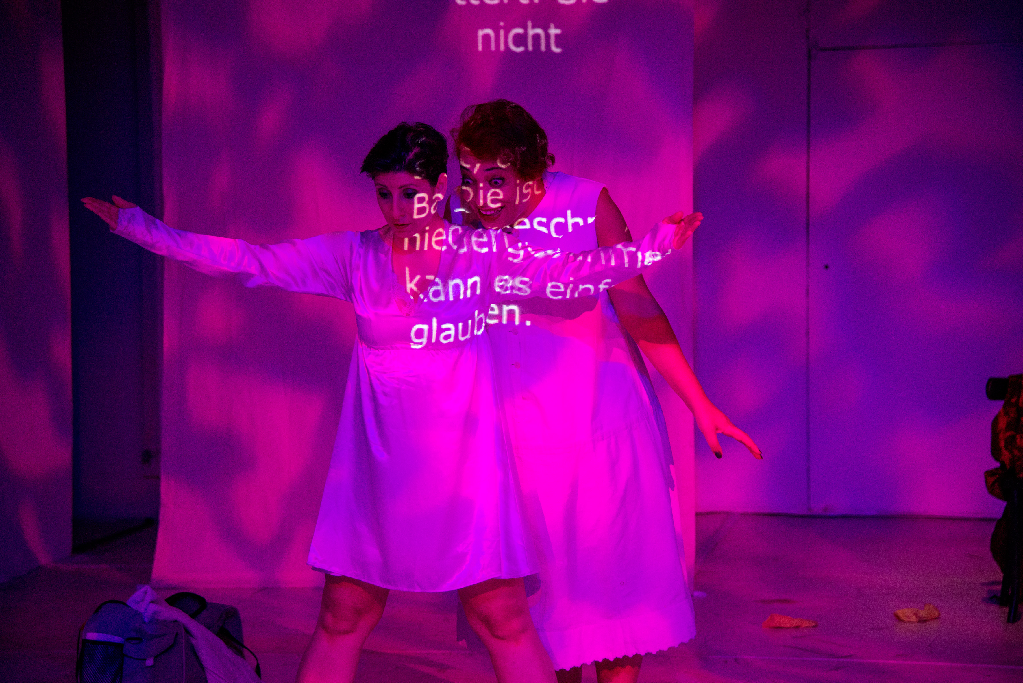 InBetween. WERK X, Wien 2015